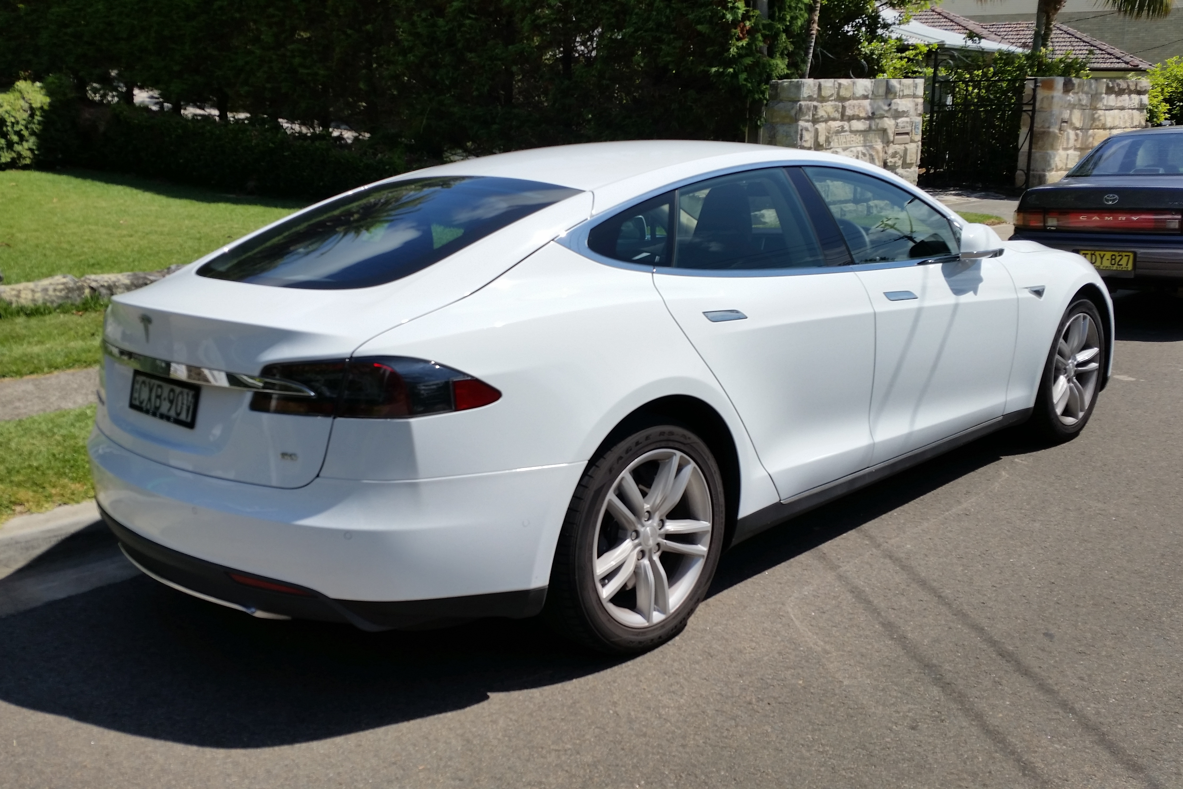 Tesla Model S 60